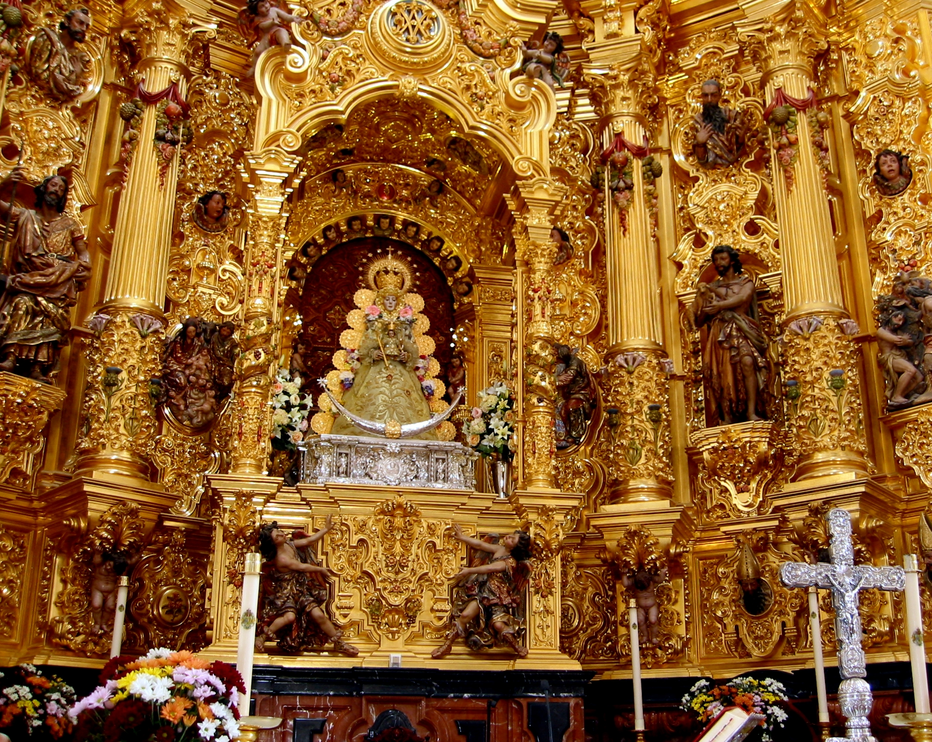 Altar con la Virgen del Rocío en El Rocío, Almonte, España.